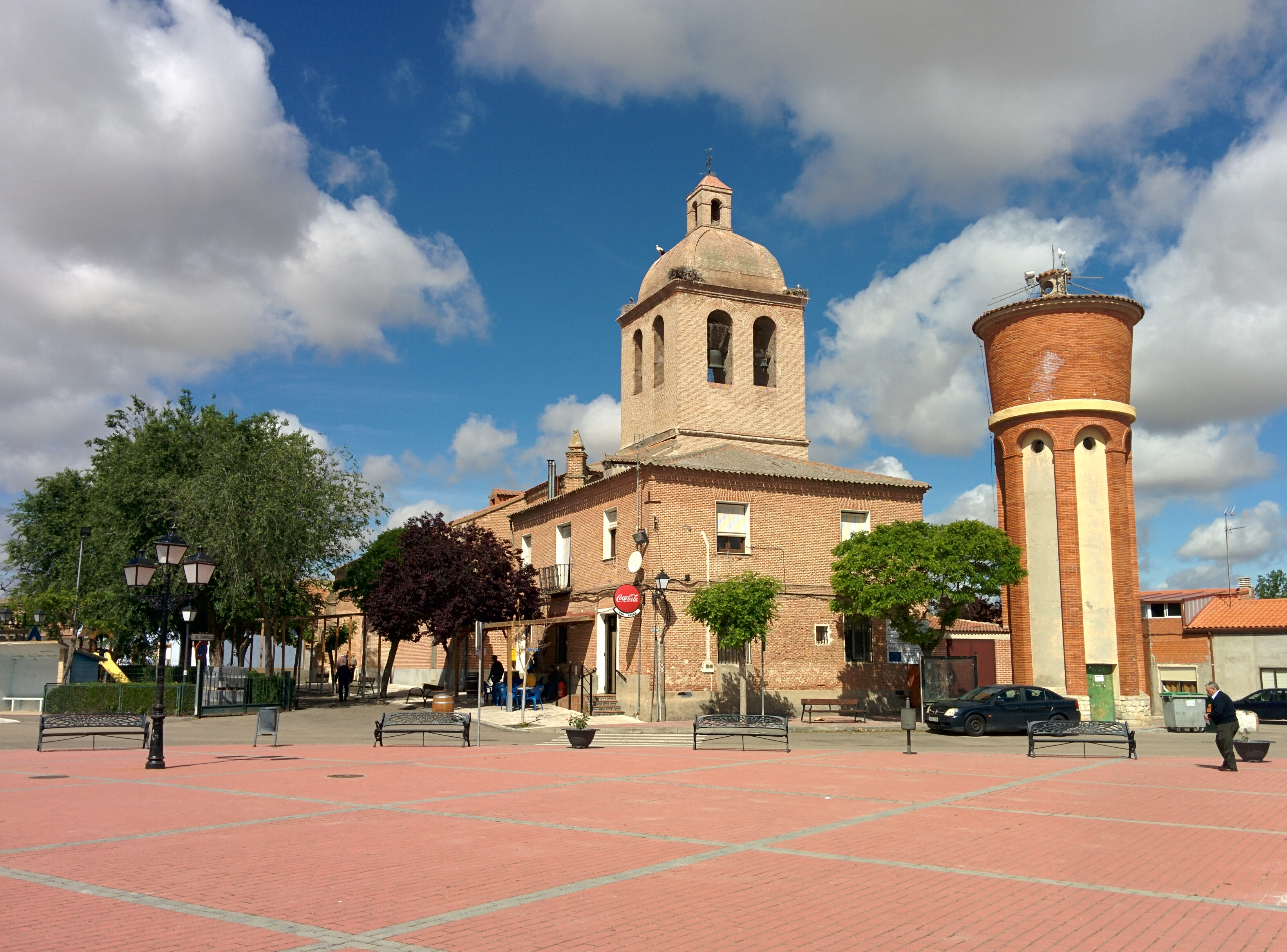 Iglesia de Santa María del Castillo y casa consistorial en Nueva Villa de las Torres (Valladolid, España).